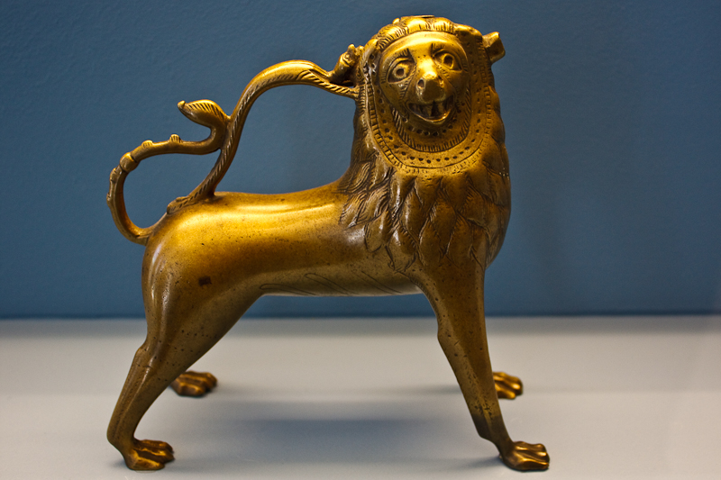 Aquamaniles (waterkannen)(Toegepaste kunst en Design, zaal 41) Duitsland (Hildesheim) Aquamanile (waterkan) in de vorm van een leeuw, 1250-1300 Geelkoper Schenking : Collectie Mr. J.W. Frederiks 1994 KB60 (KN&V) Germany (Hildesheim) Aquamanile (water pitcher) in the form of a lion, 1250-1300 Brass Donation: Collection Mr. J.W. Frederiks 1994 KB60 (KN & V)